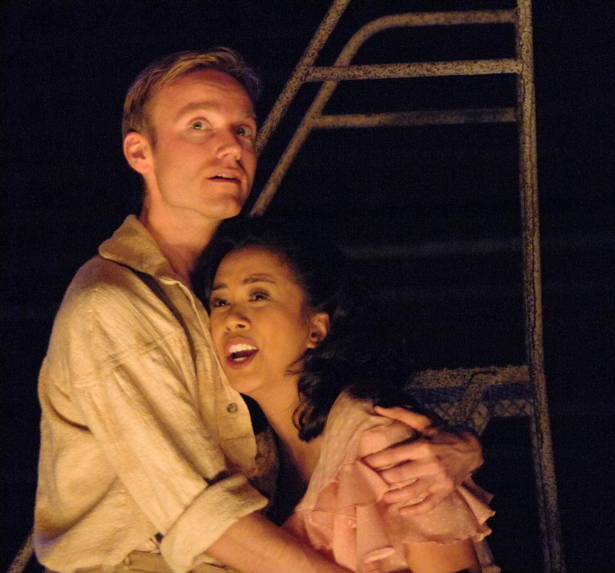 Thomas Harke als Bobby Strong in der englischsprachigen Erstaufführung des Musicals Urinetown am Kelley Theatre Stuttgart (mit Denise Woodmansee als Hope)